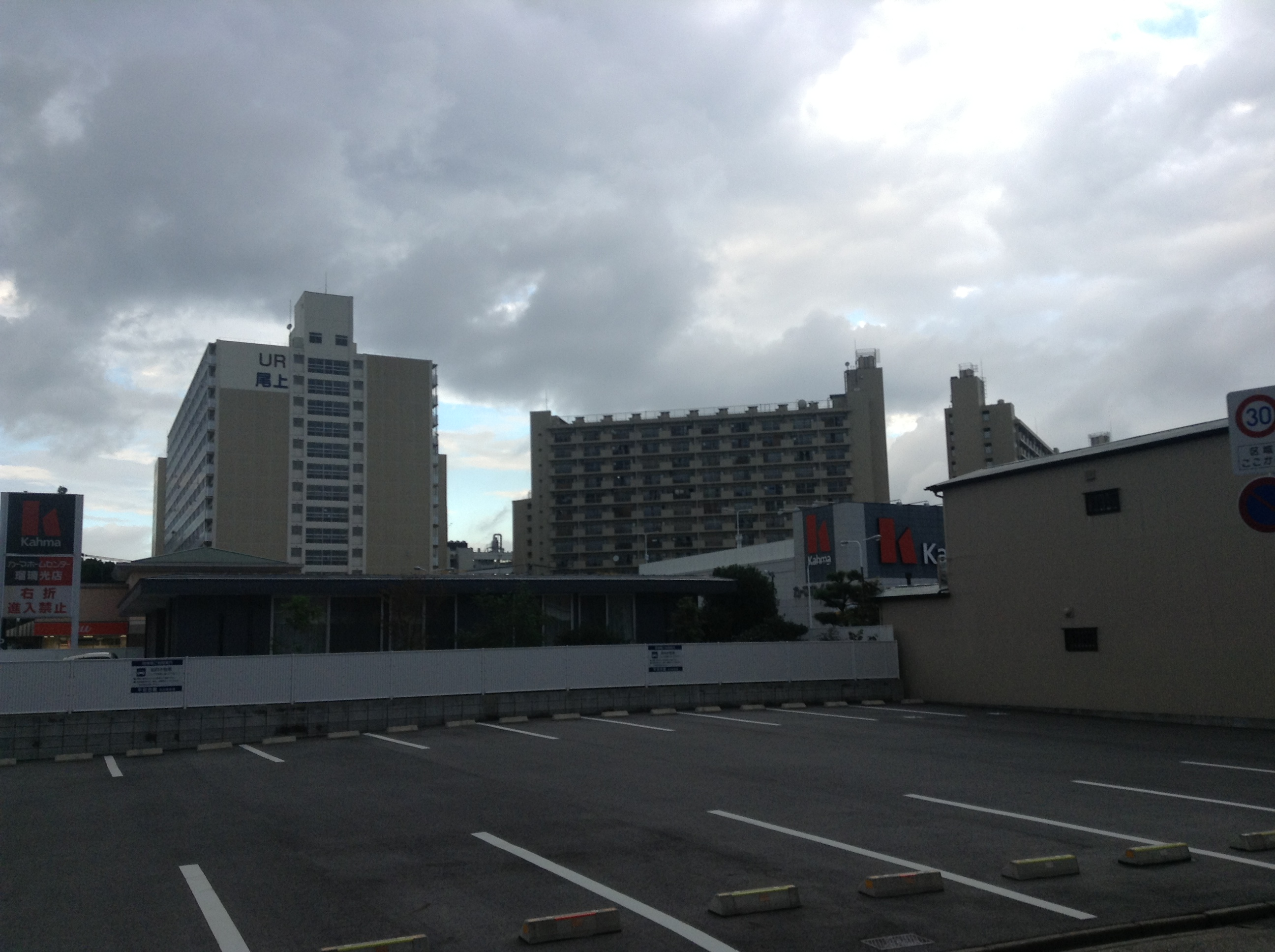 名古屋市北区尾上町を南側から写す